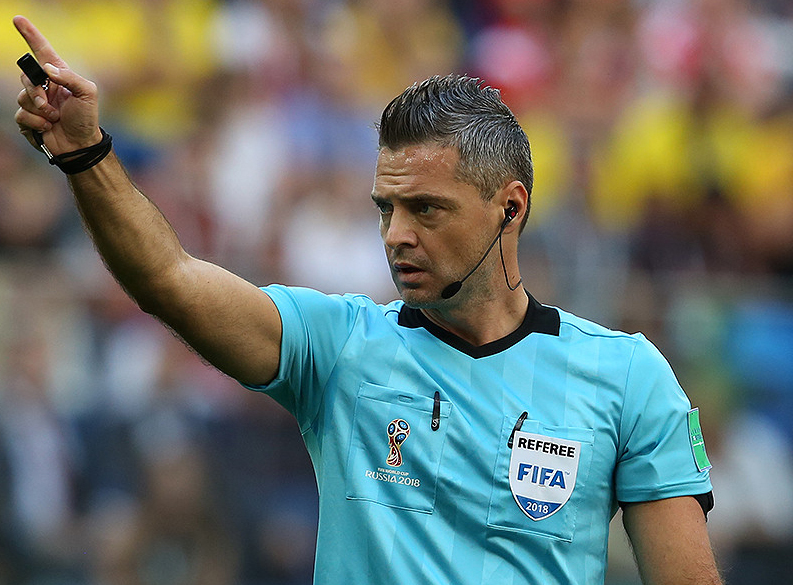 Сборная Швеции зрелищно вышла в четвертьфинал ЧМ-2018